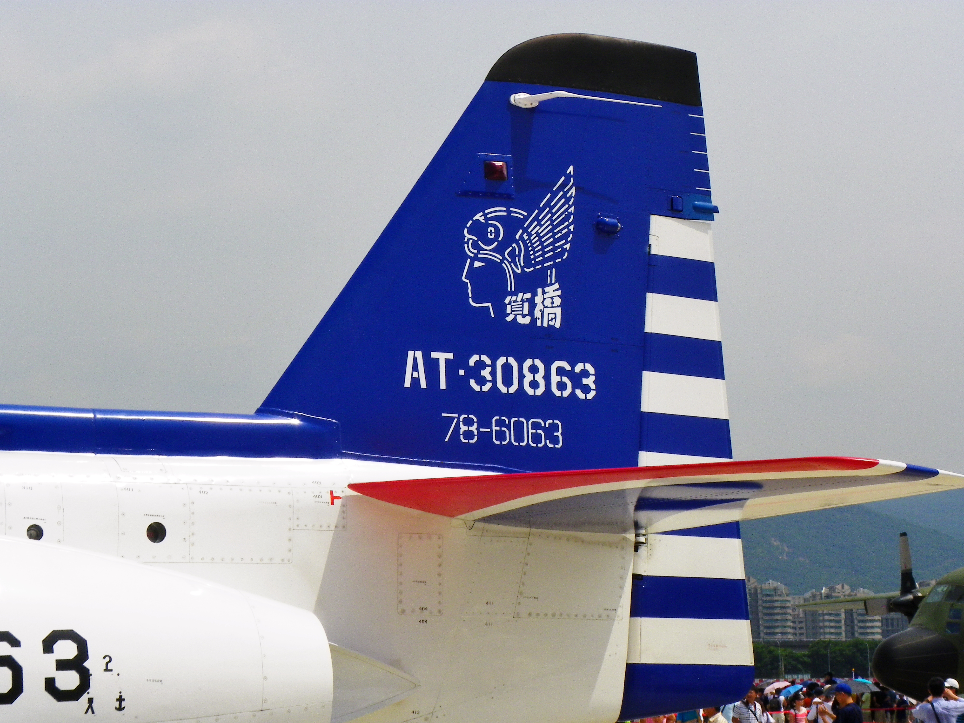 中文（台灣）: AT-3教練機尾翼特寫，攝於2011年空軍松山基地營區開放活動。